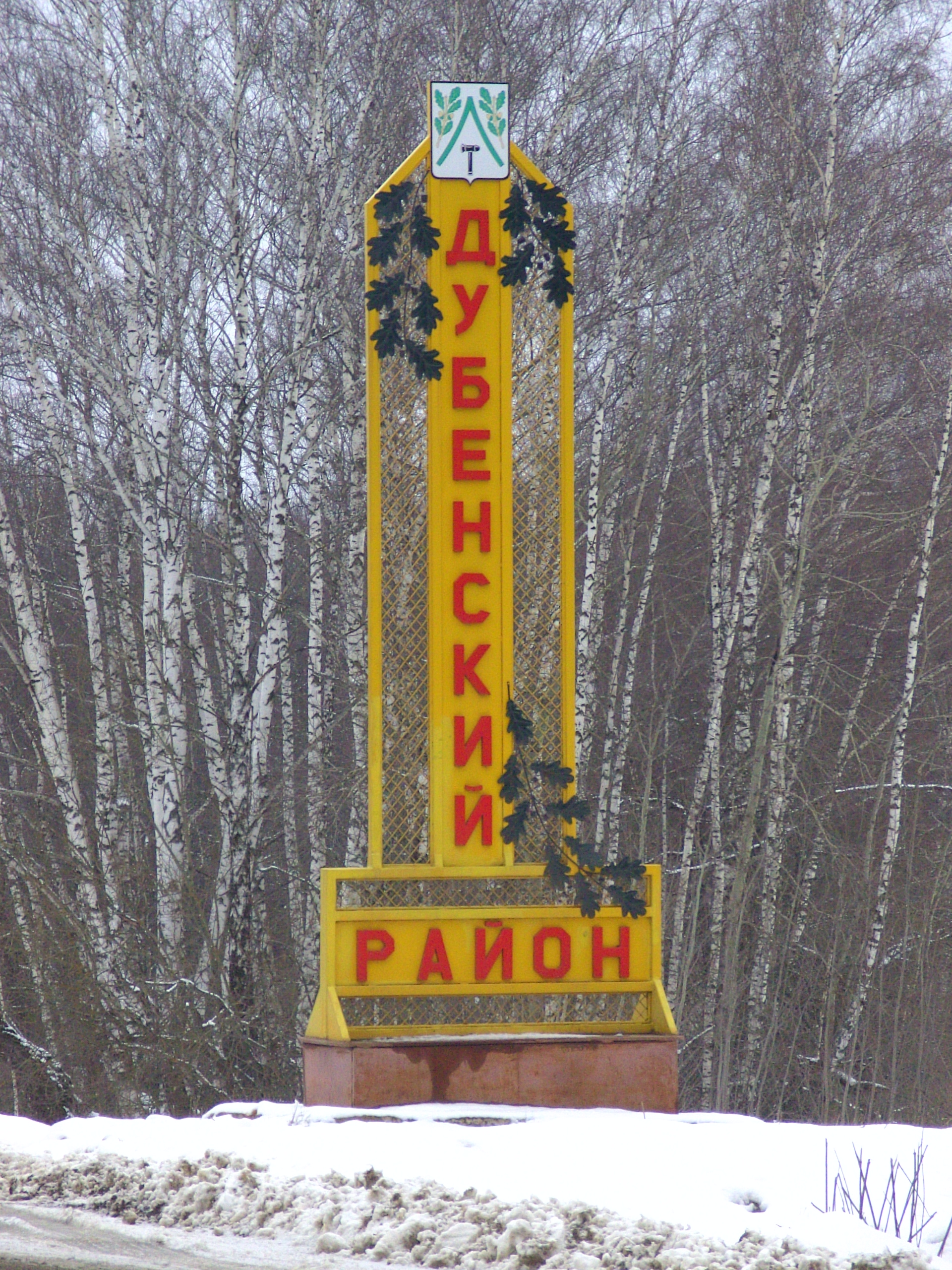 Дубенский район